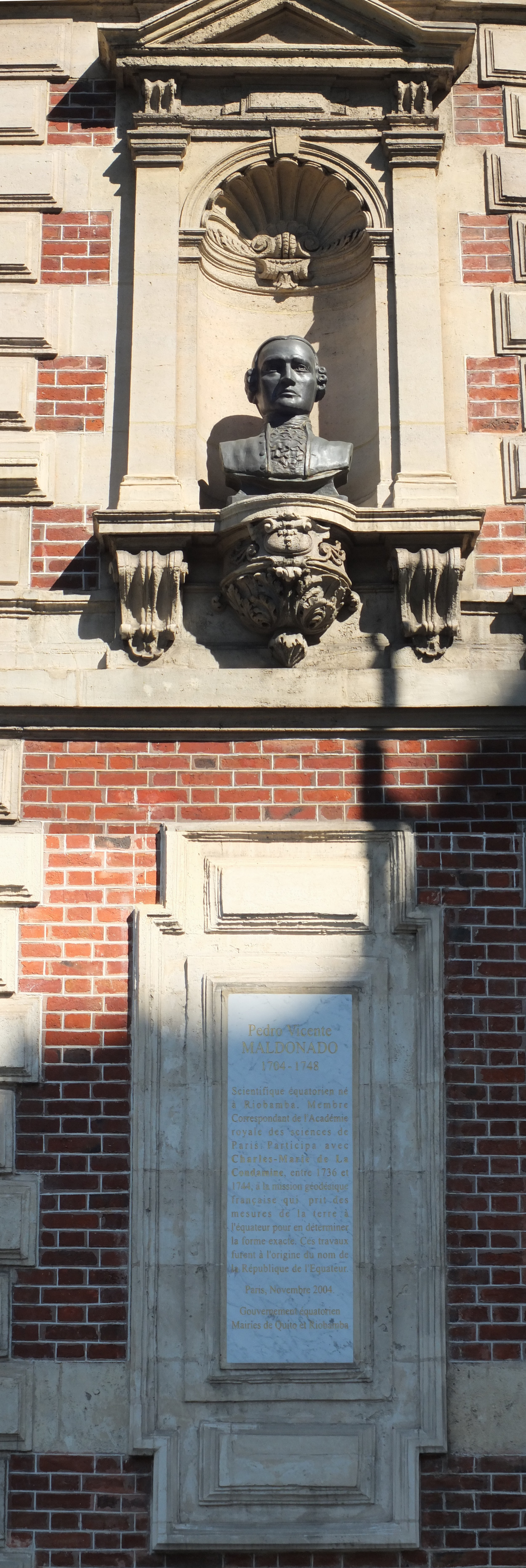 Monument à Pedro Vicenete Maldonado (1704-1748), scientifique équatorien, 53 boulevard de Courcelles et place de la République-de-l'Equateur, Paris (8e arrond.)